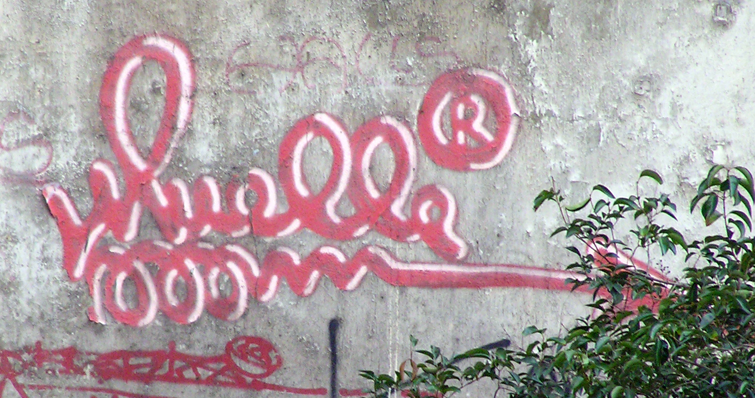 Firma de Muelle en la calle Montera de Madrid junto a otra de Akracia 4cd y Halls